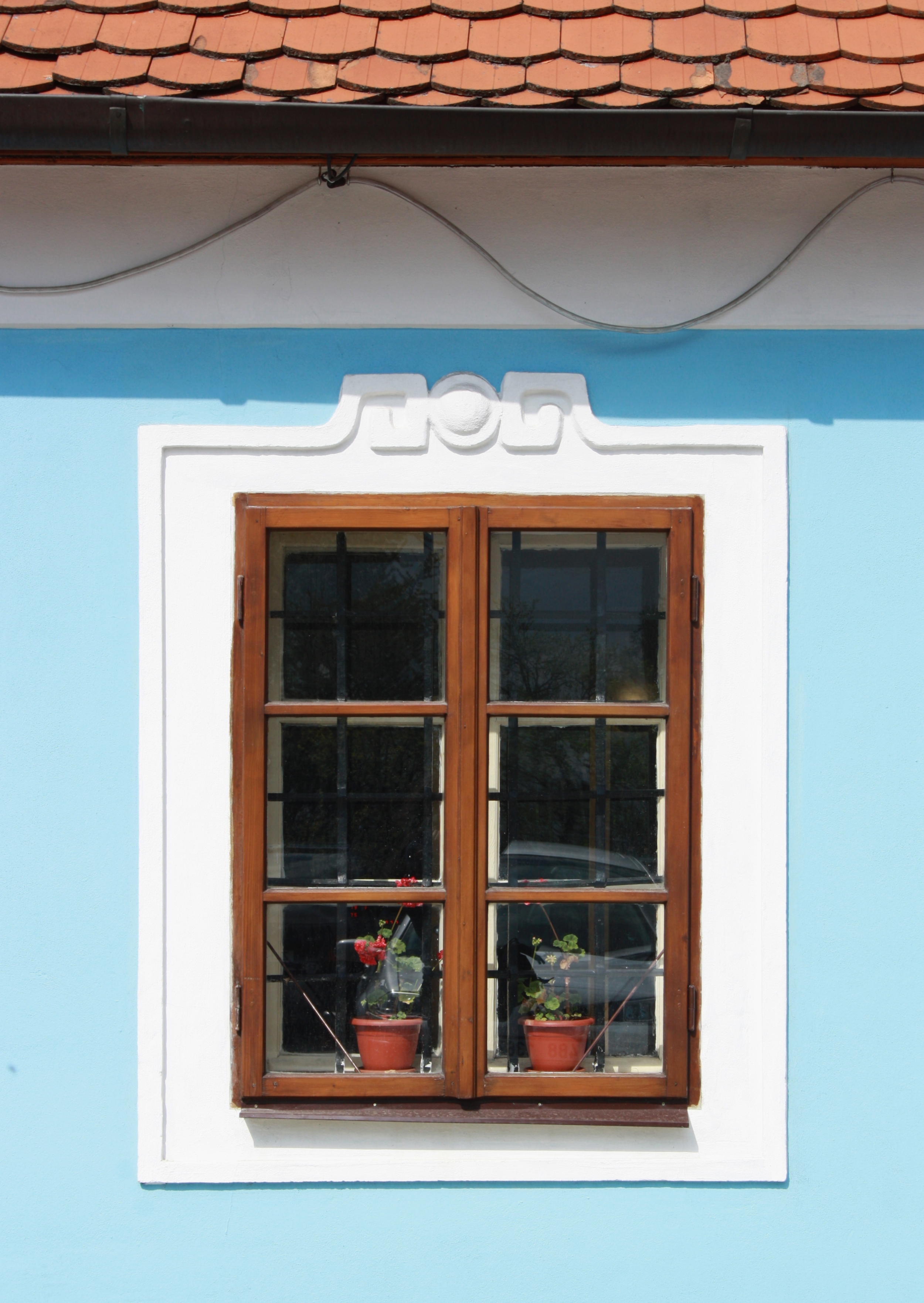 Moravec - okno se šambránou This photograph was taken within the scope of the 'Czech Municipalities Photographs' grant. This photograph was taken with a DSLR from WMCZ's Camera grant.